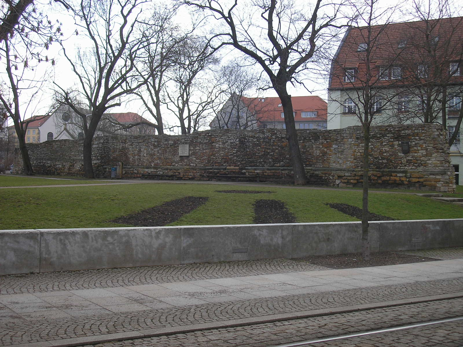 Reste der inneren Stadtmauer am Johannestor in Erfurt (Thüringen).